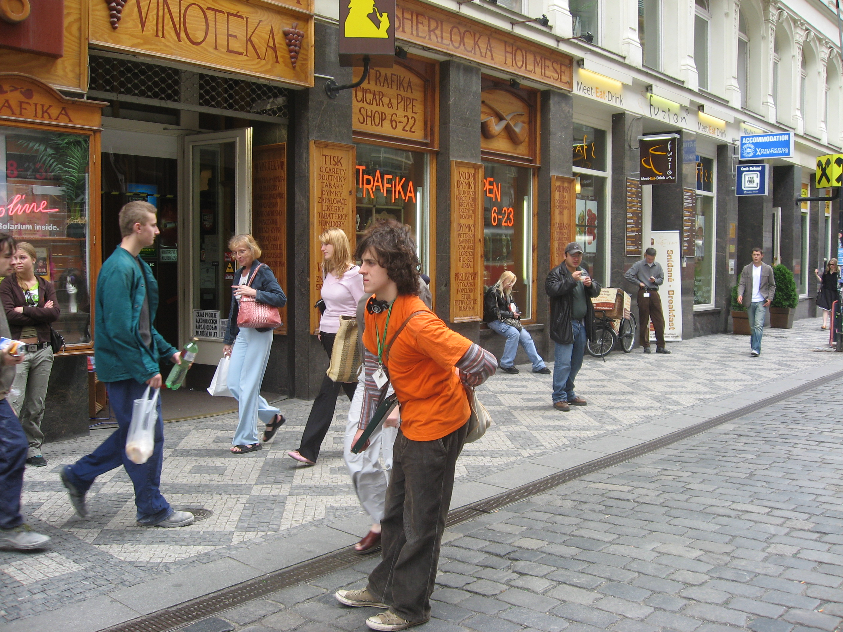 Člen Hnutí Duha se pokouší získávat nové členy a sponzory u zastávky tramvaje Vodičkova, u domu Vodičkova č. o. 38